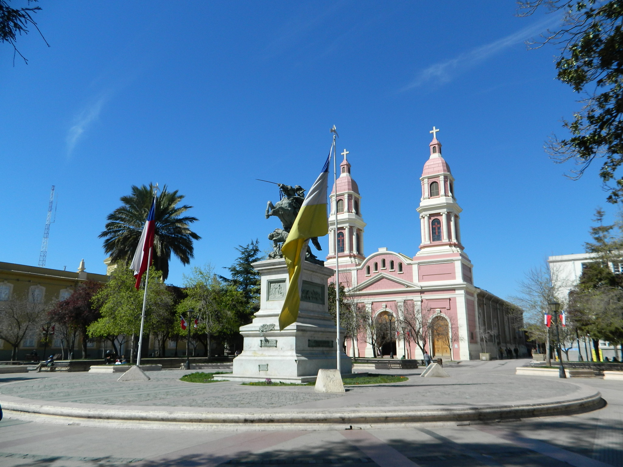 La Plaza de Los Héroes corresponde a una traza fundacional de la Villa Santa Cruz de Triana, que comprendía 64 manzanas, con la plaza en el centro cortada en cruz por dos calles (la Cruz de Triana). Su fundador, el Gobernador José Antonio Manso de Velasco, en octubre de 1743, le da esta forma especial que sólo la tienen cinco plazas fundacionales de América. El 1º y 2 de octubre de 1814 fue escenario de la Batalla de Rancagua, donde se puso fin al período de la Independencia de Chile llamado la “Patria Vieja” y en donde el generar Bernado O’Higgins con un número reducido de patriotas resiste por dos días cercado por las fuerzas realistas. En el centro de la plaza se ha erguido un monumento ecuestre en honor a O’Higgins, que recuerda este importante acontecimiento histórico. Su borde suroriente es el más antiguo, en donde se encuentran la Gobernación de Cachapoal, la Casa Parroquial y la Catedral. La plaza de Rancagua es única, no puede confundirse con otra. Hablar de esta plaza es referirse al lugar que dio origen a la ciudad y desde la que se extendió hacia los cuatro vientos a partir de dos calles, ejes principales, dándola la singularidad de una plaza en cruz. This is a photo of a national monument in Chile: 377